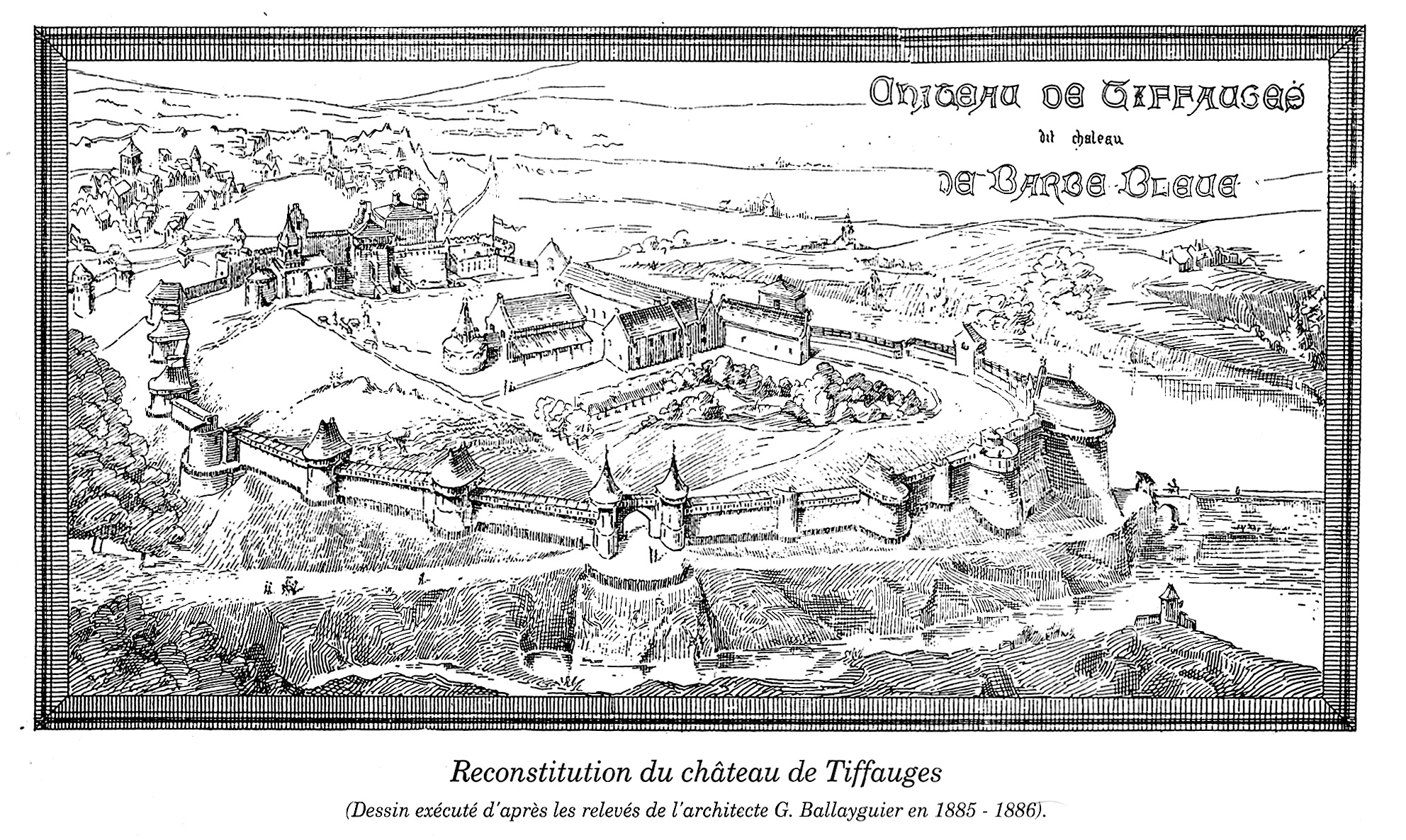 Georges Balleyguier (architecte), Château de Tiffauges dit château de Barbe Bleue, in revue L'Ami des monuments et des arts, n°21-22, Paris, 1890.